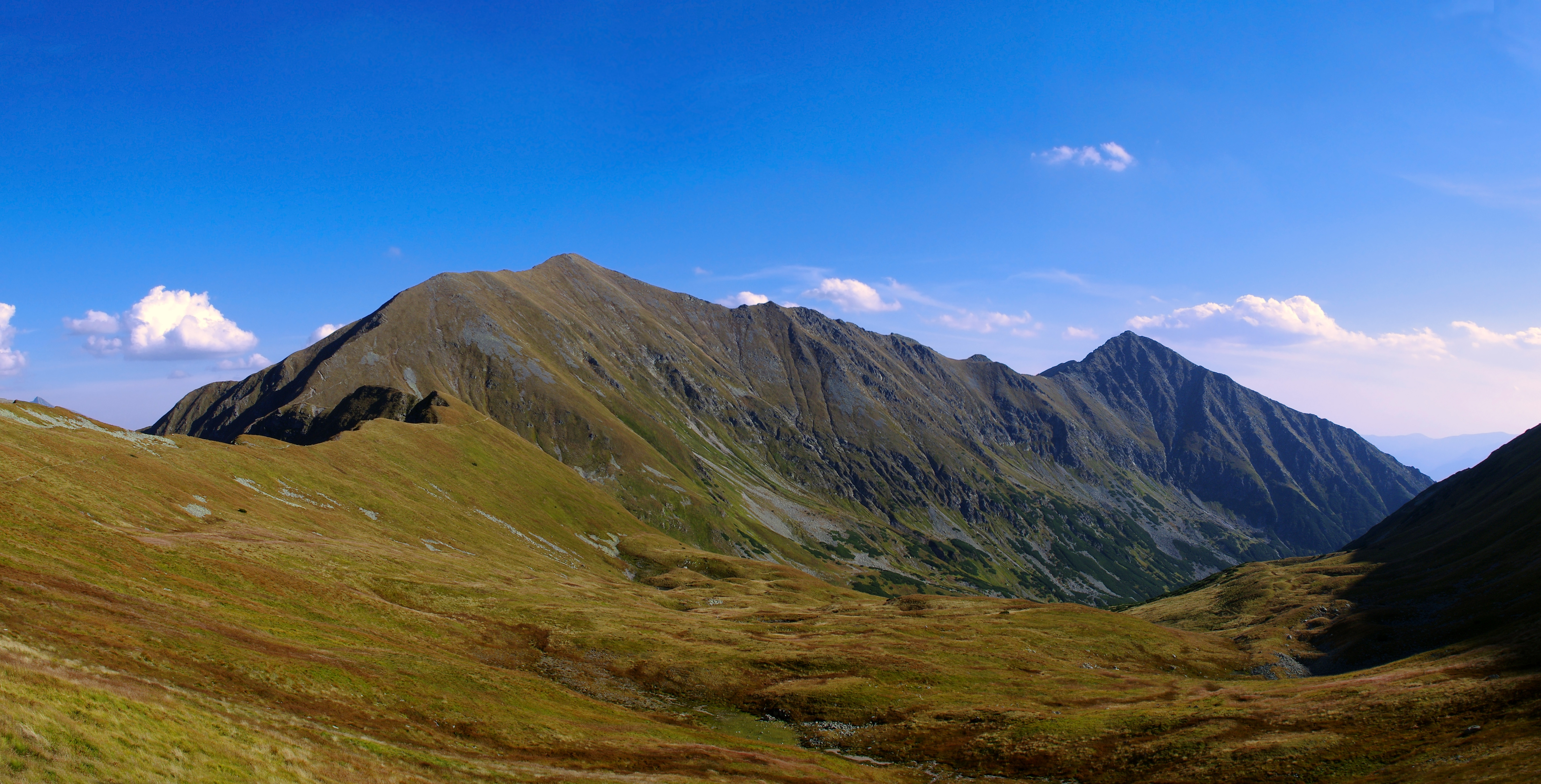 Gáborova dolinaSlovenčina: Gáborova dolina